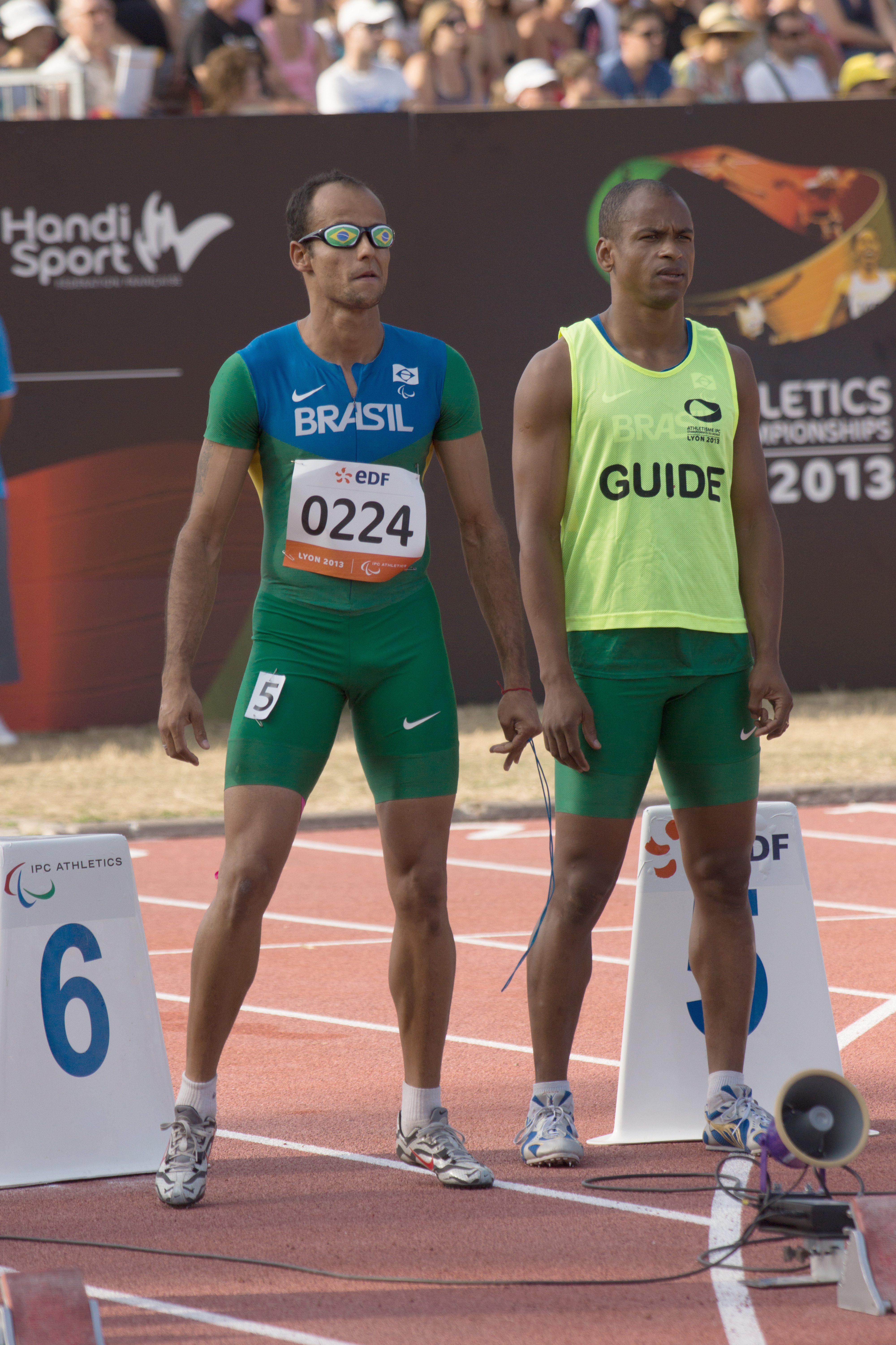 Championnats du monde d'athlétisme handisport 2013.